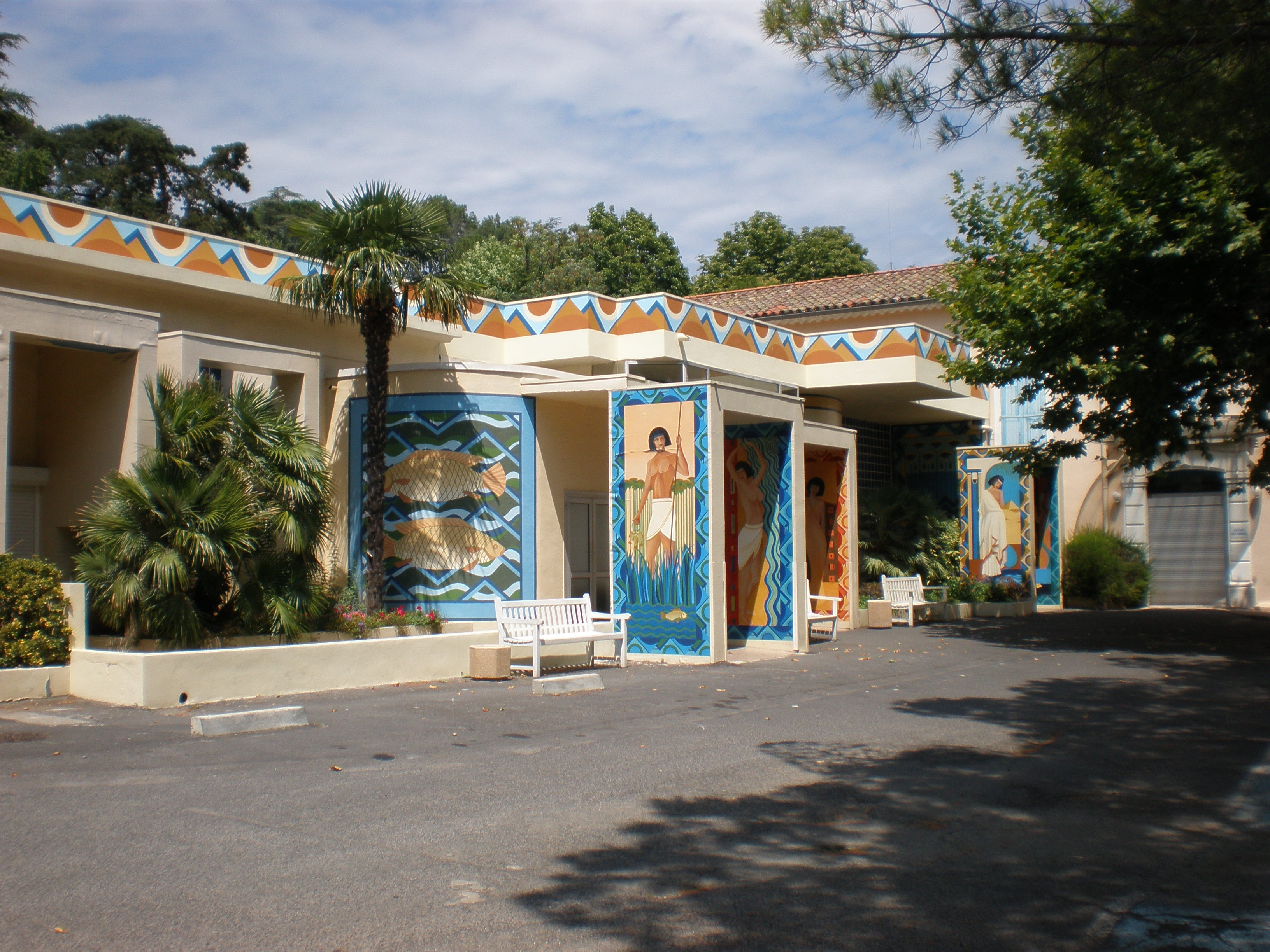 Les thermes de Lamalou-les-Bains (Hérault, 34)